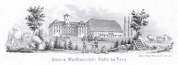 Ackerbauschule Rütti bei Zollikofen BE, Schweiz